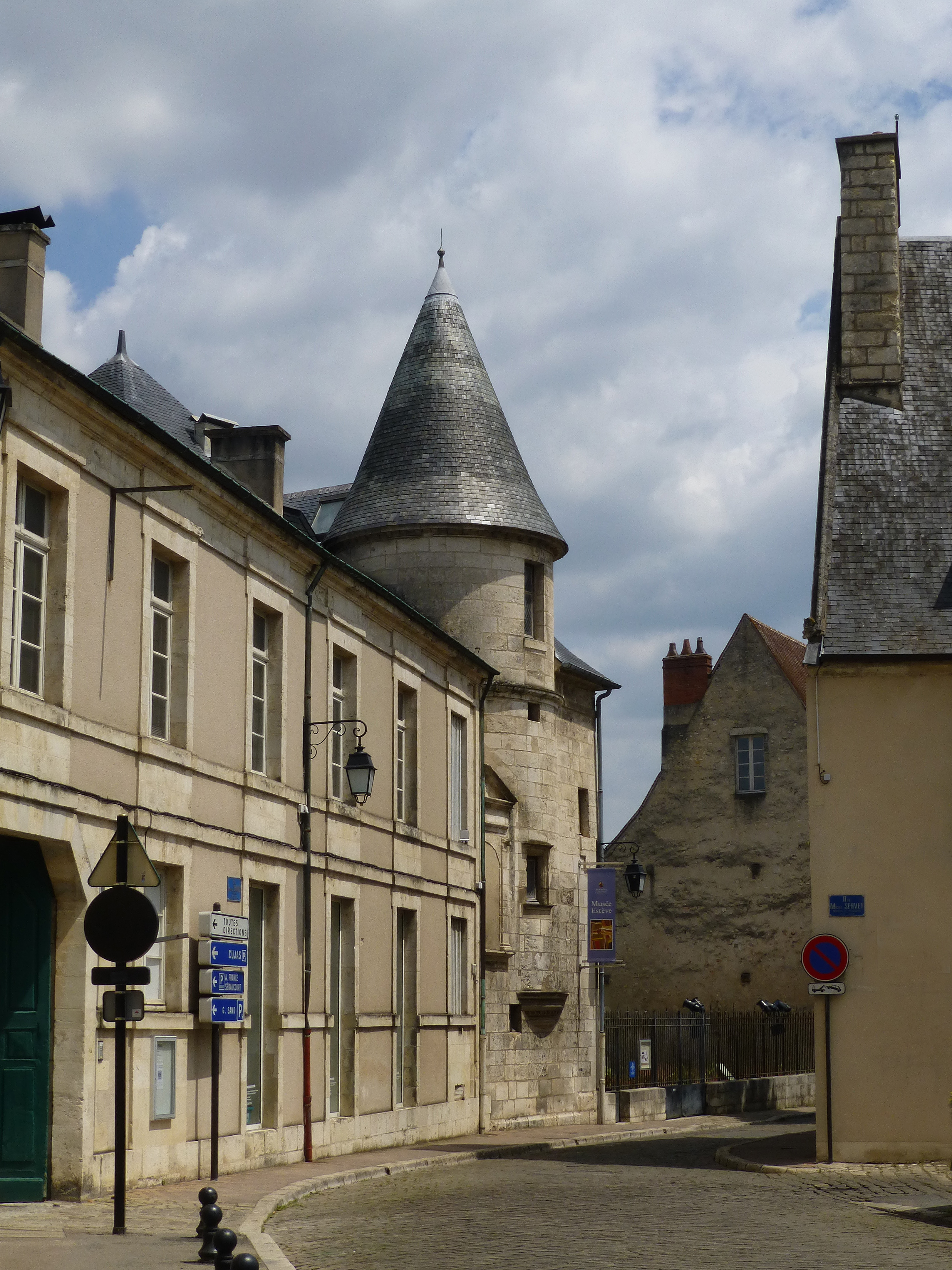 Bourges (Cher) : Hôtel des Échevins